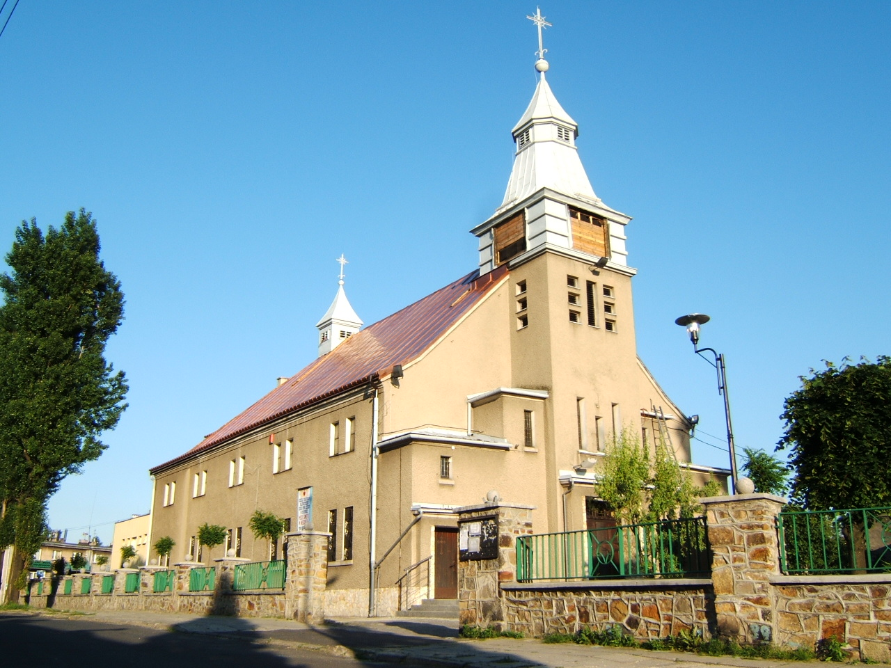 Kościół pw. Najświętszego Serca Pana Jezusa w Bykowinie - dzielnicy Rudy Śląskiej.